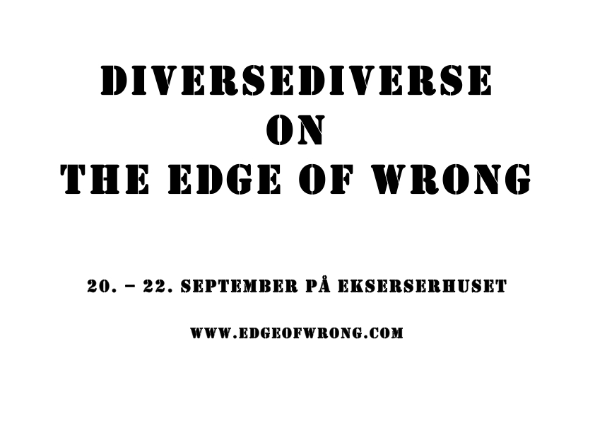 Poster